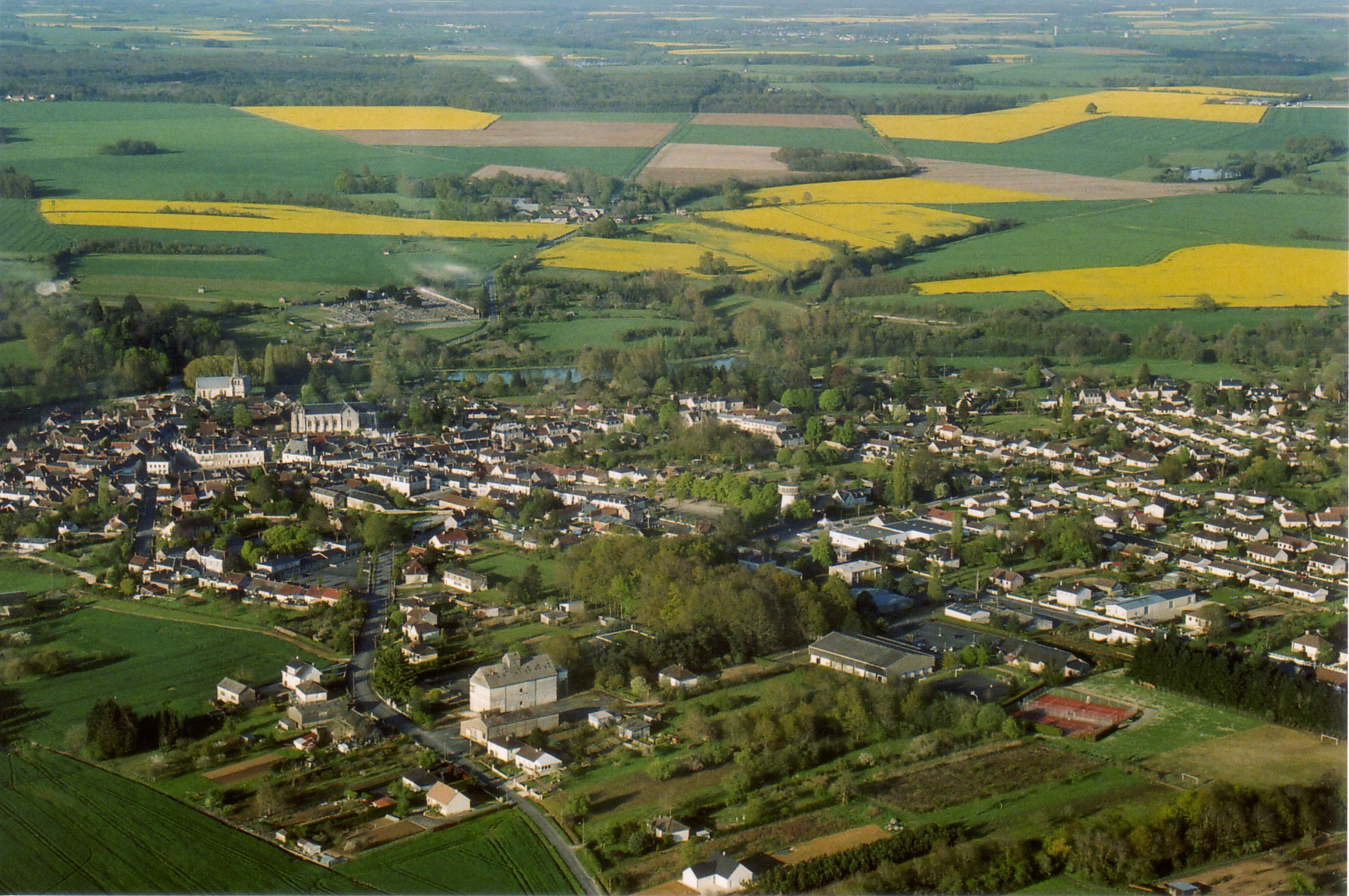 Ecueillé Indre 36240